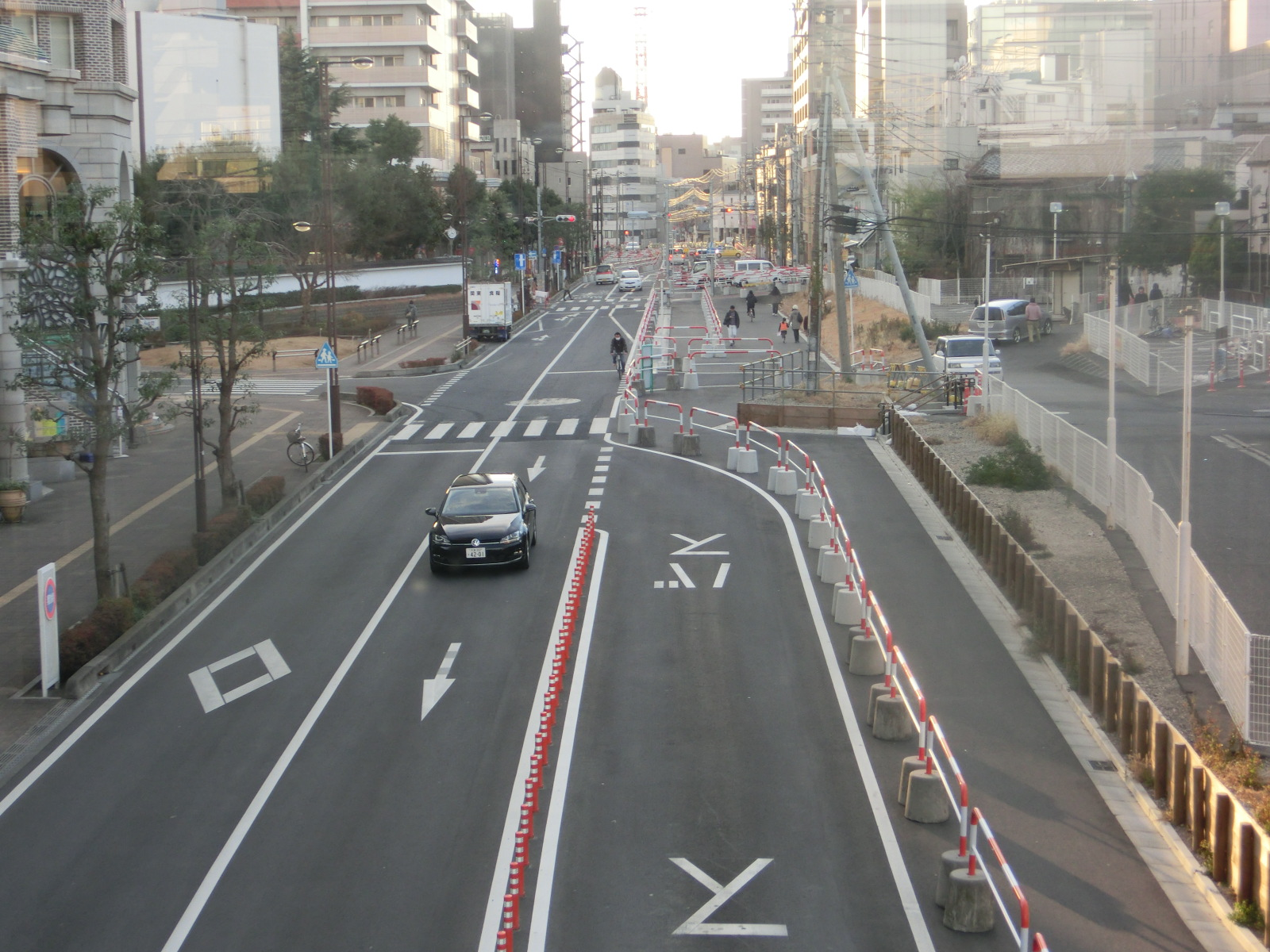 暫定2車線で供用されている高砂工区。